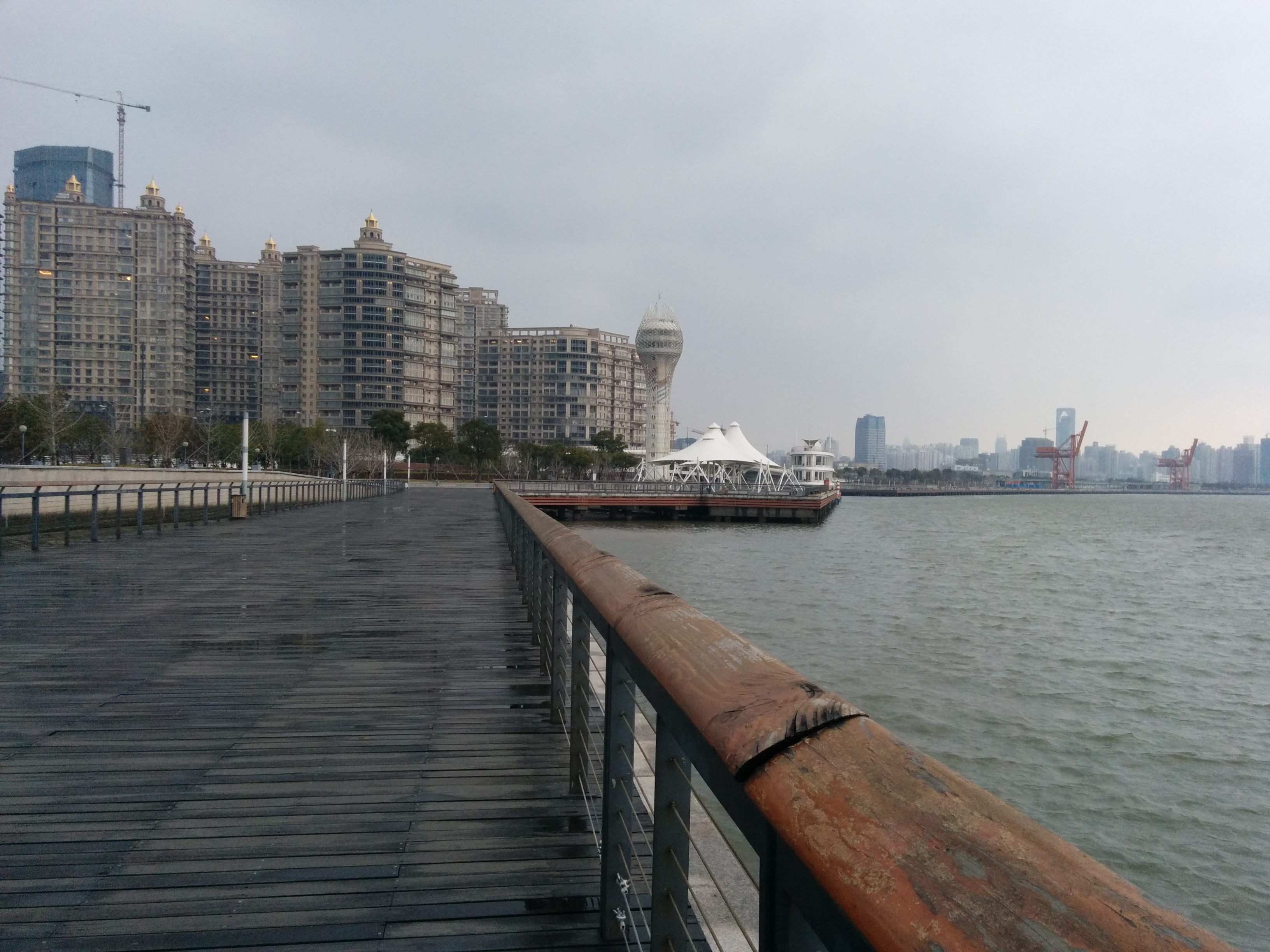 中文（中国大陆）: 上海徐汇滨江